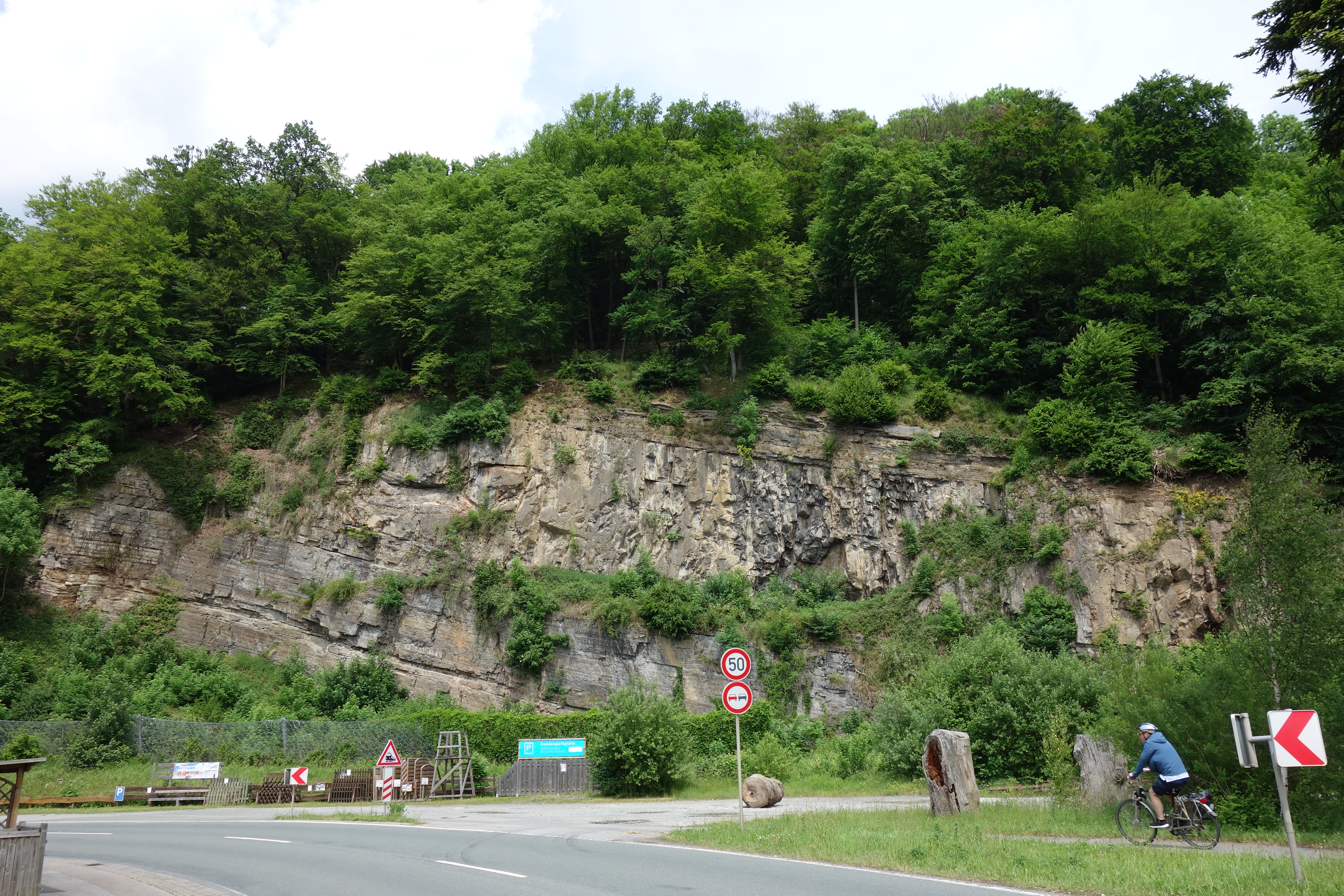 Felsanschnitt der Bahntrasse im Naturschutzgebiet Hainberg (NSG HSK-135). NSG ab Hangkante.